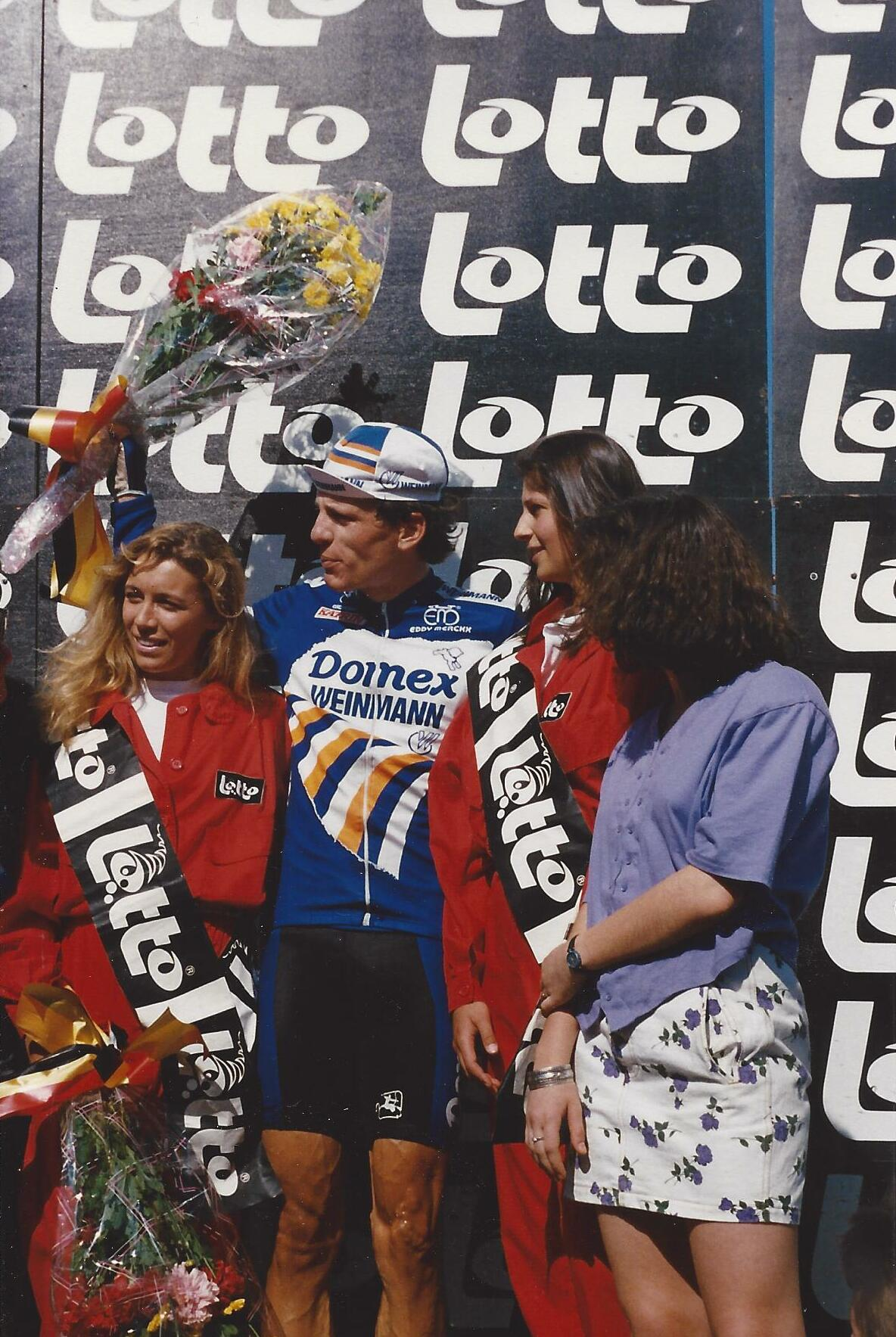 THOMAS WEGMULLER